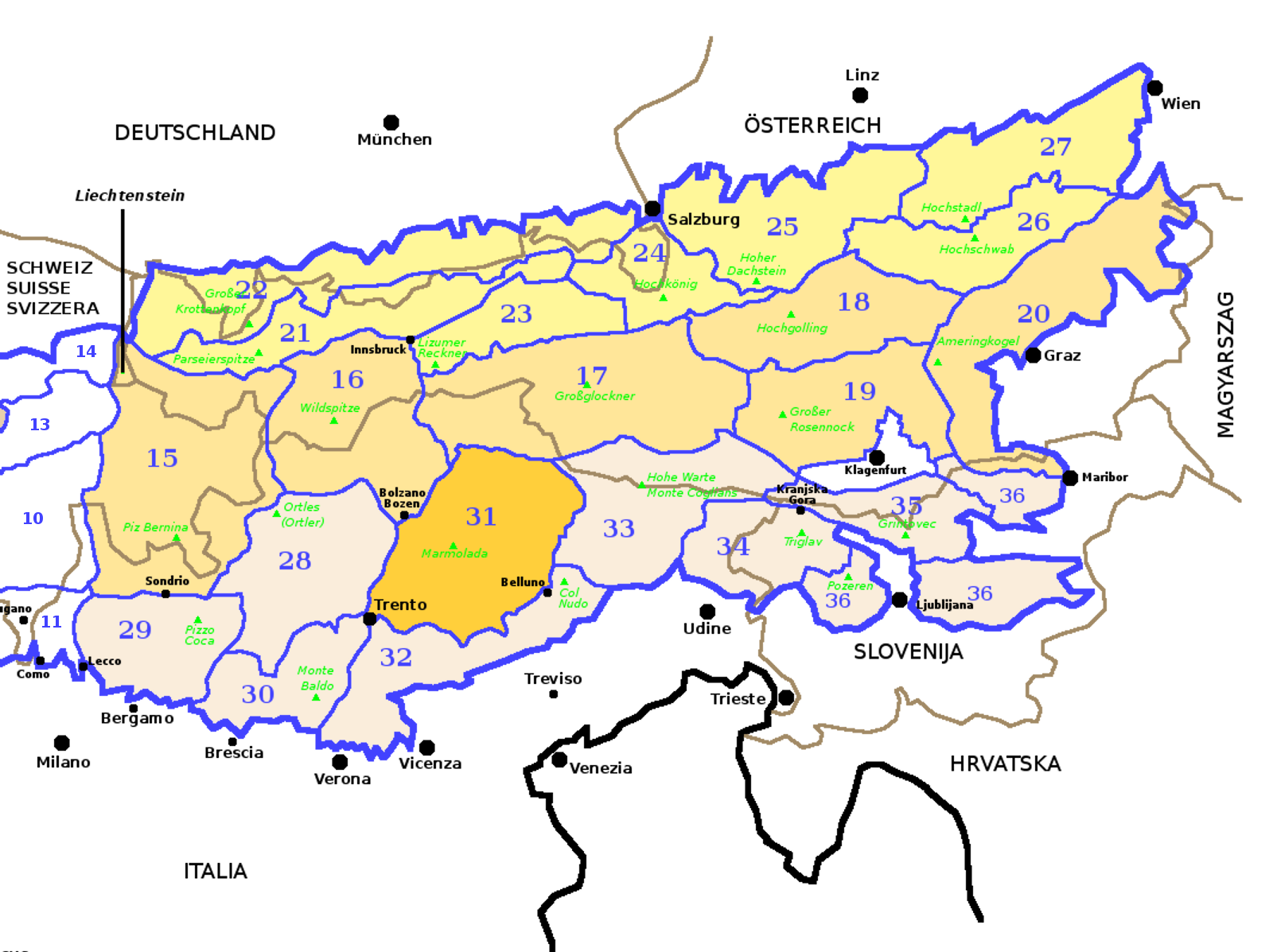 Alpi Orientali secondo la SOIUSA con evidenziate le Dolomiti